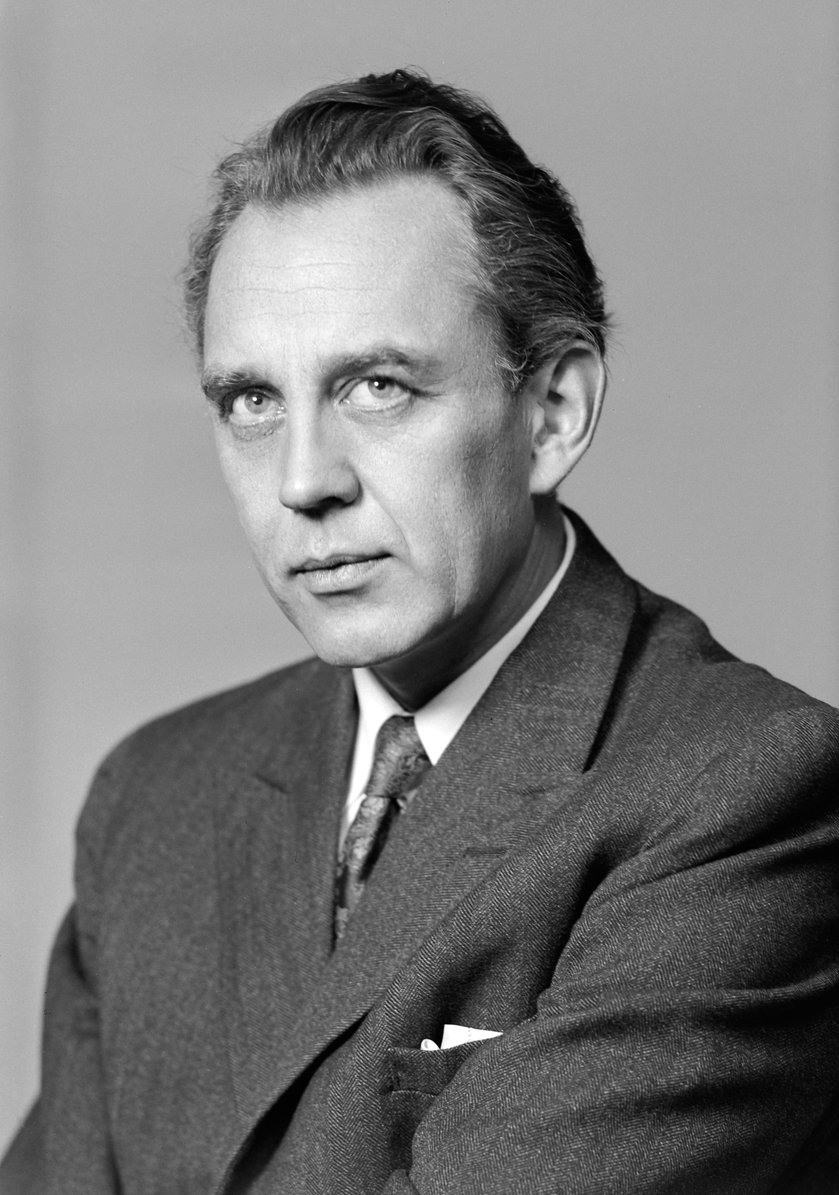 Hamararkitekten Finn Poppe. Foto: Firmaet Carl Normann, ca. 1935–57. Inventarnummer NO-37872-01 i Domkirkeoddens fotosamling. Tekst i Digitalt museum: «Arkitekt Finn Poppe (1908-1993). Han etablerte seg som arkitekt på Hamar i begynnelsen av 1930-åra. Han tegnet en rekke nybygg i byen, blant annet Astoriabygget og rutebilstasjonen ved Østre torg. SE "STIFTSTAD OG BYGDEBY, HAMARS HISTORIE 1935-1999" S. 25.»